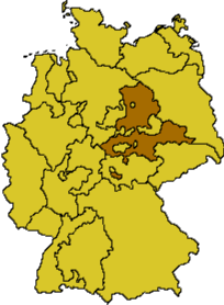 Ekd-sachsen